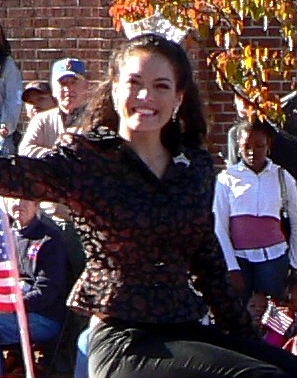 Jamie Ginn, Miss Delaware 2006